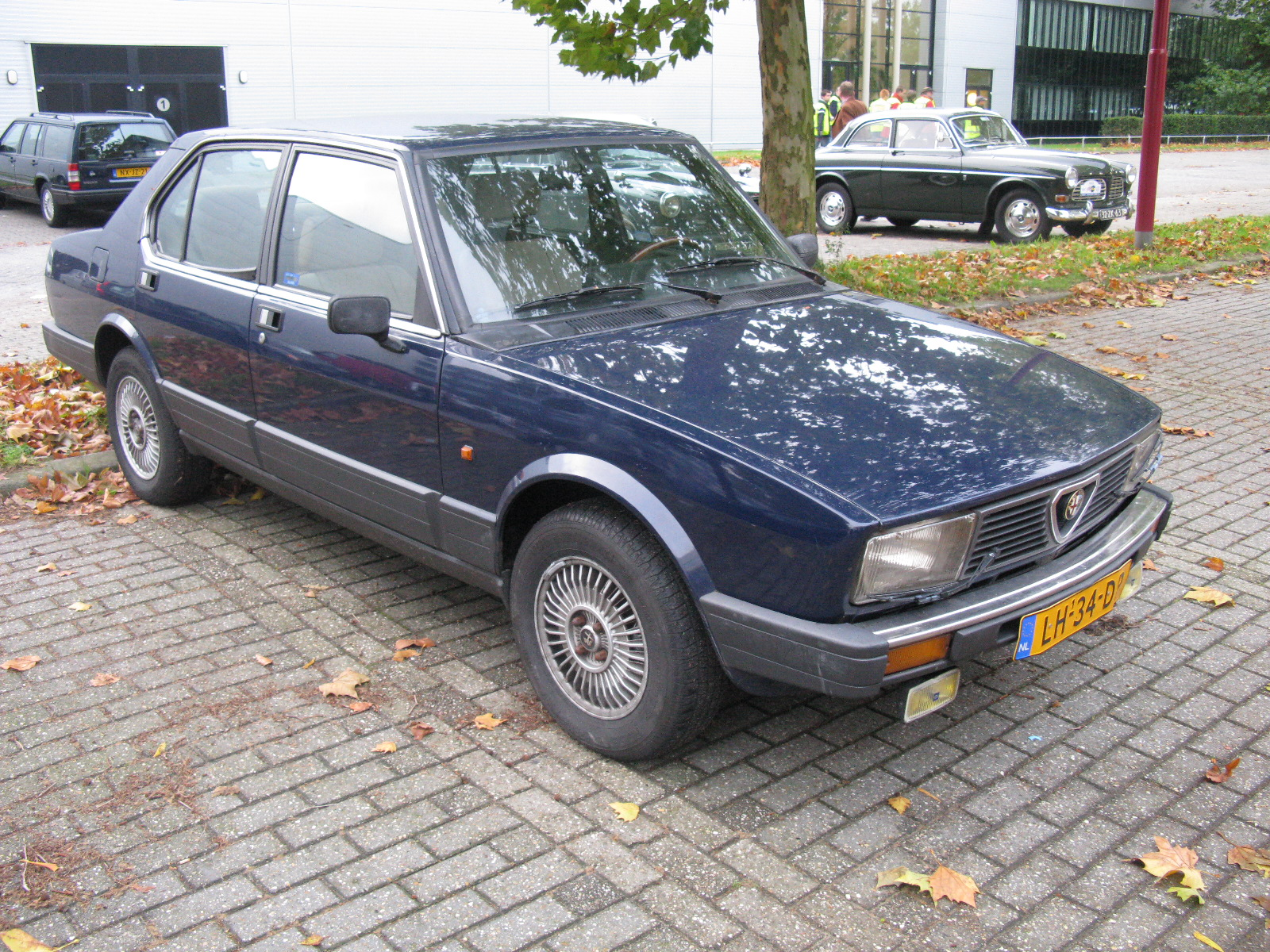 Volvo Klassiekers Beurs, Utrecht